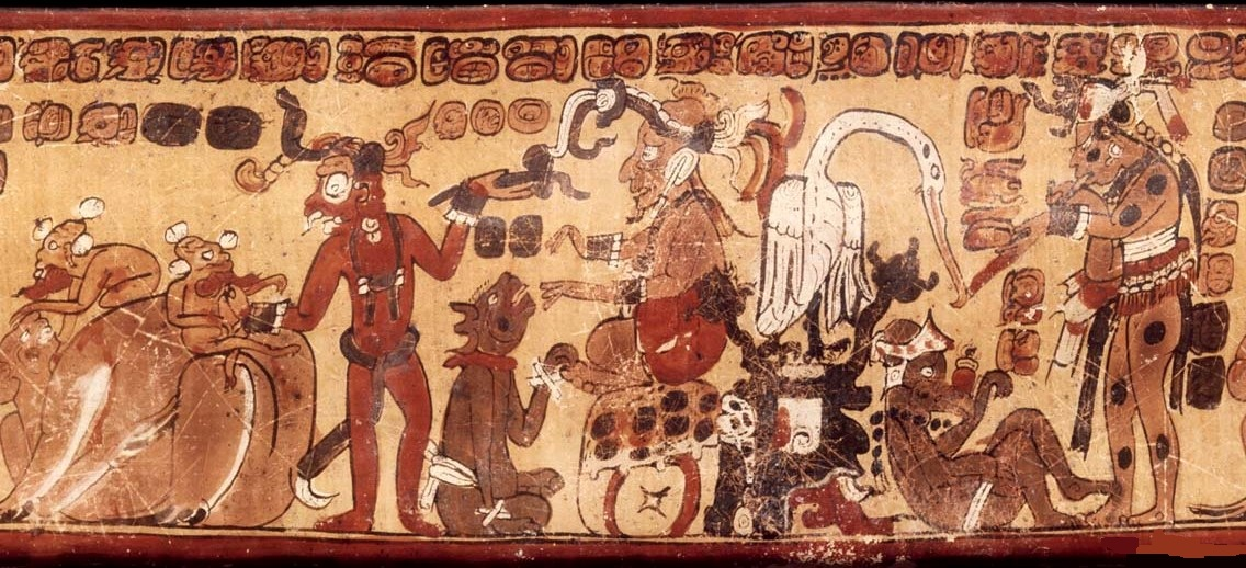 Jarron Maya con una Escena de Caza; hay Hunahpú en la imagen.